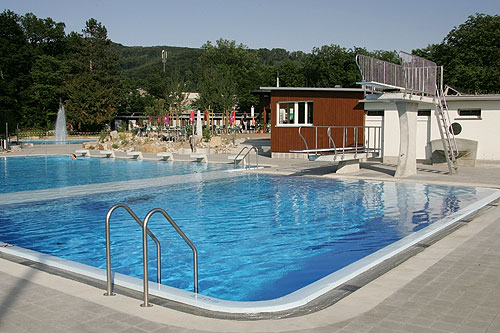 Schwimmbad Arlesheim: Sprungbecken